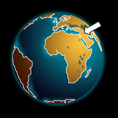 Ubicacion final del observador del Génesis en la deriva continental